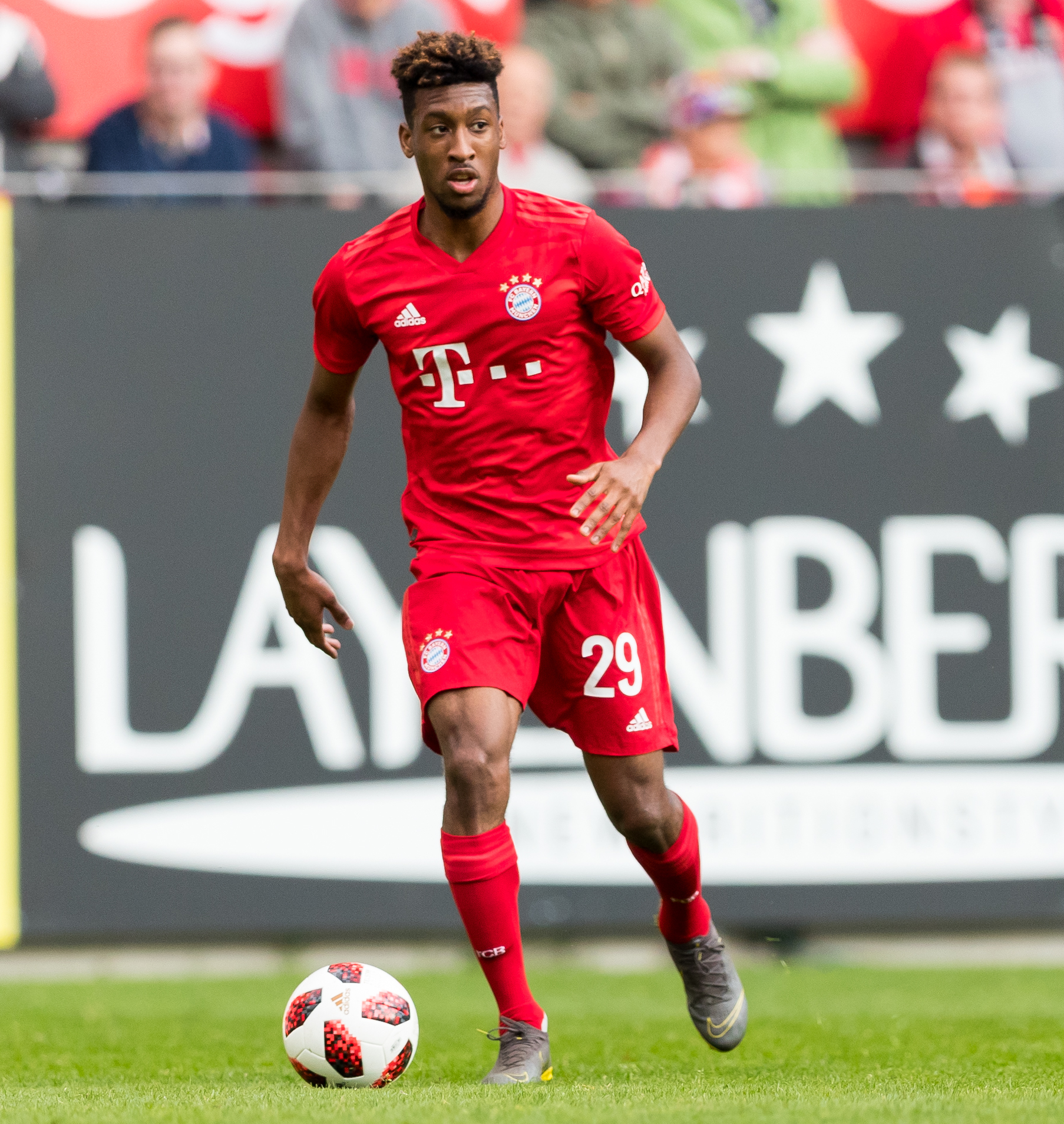 during 1.FC Kaiserslautern vs FC Bayern München at Fritz-Walter-Stadion, Kaiserslautern, Rheinland-Pfalz, Germany on 2019-05-27, Photo: Sven Mandel